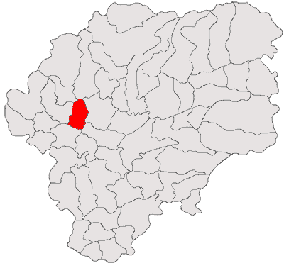 Categorie:Hărţi ale judeţului Bistriţa-Năsăud